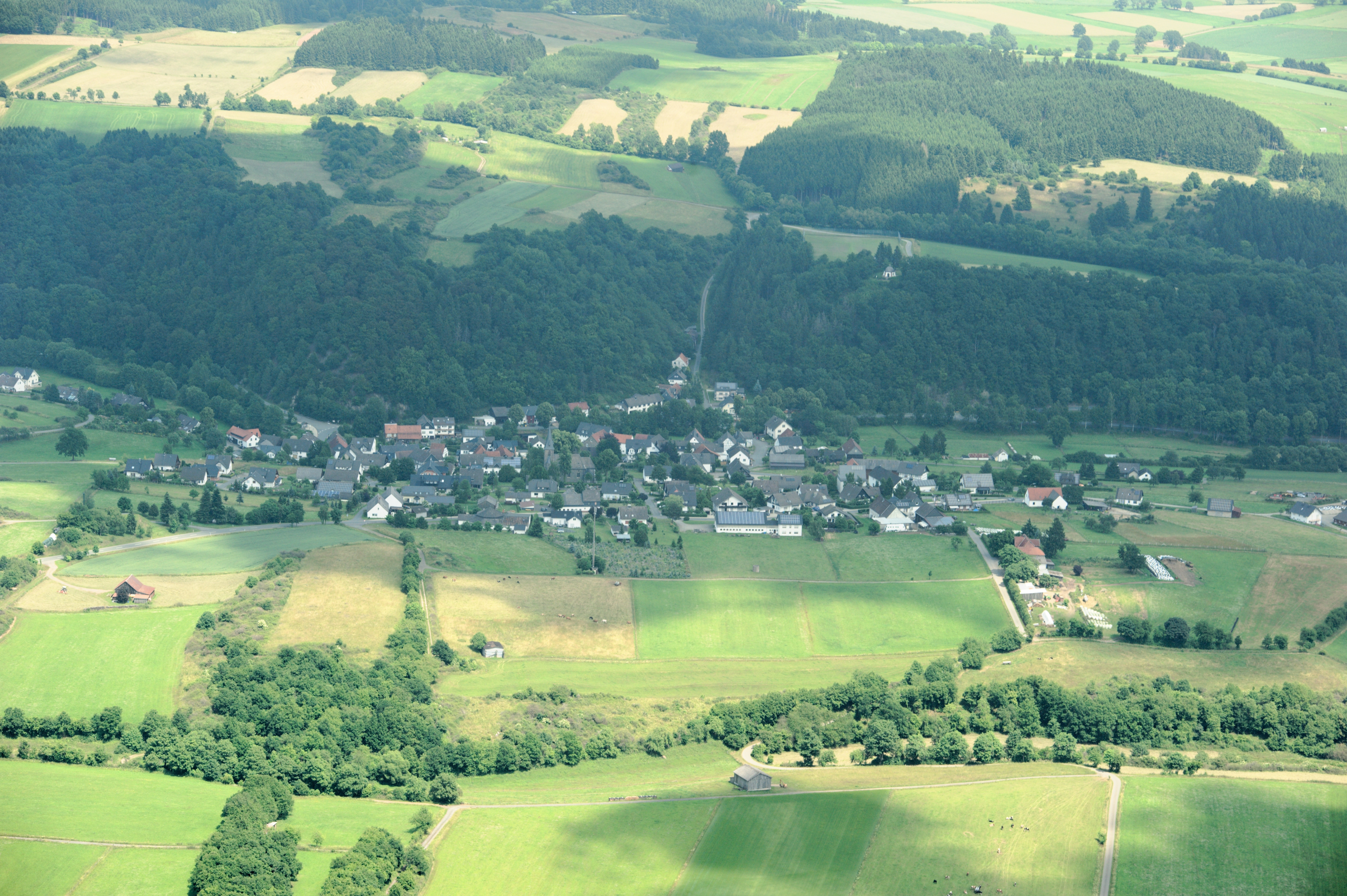 Fotoflug Sauerland-Ost: Braunshausen, Hallenberg; im oberen Bilddrittel Teile des Naturschutzgebiets „Heckenlandschaft Braunshausen“, unten links Teile des Naturschutzgebiets „Steinschlade“, weitere Bereiche in Landschaftsschutzgebieten.